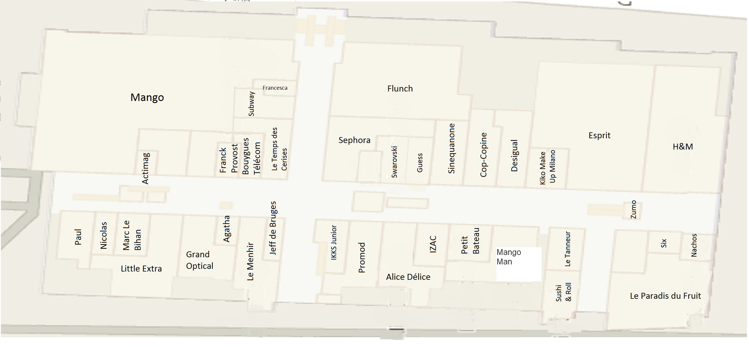 Plan Rez de Chaussée du Centre Commercial